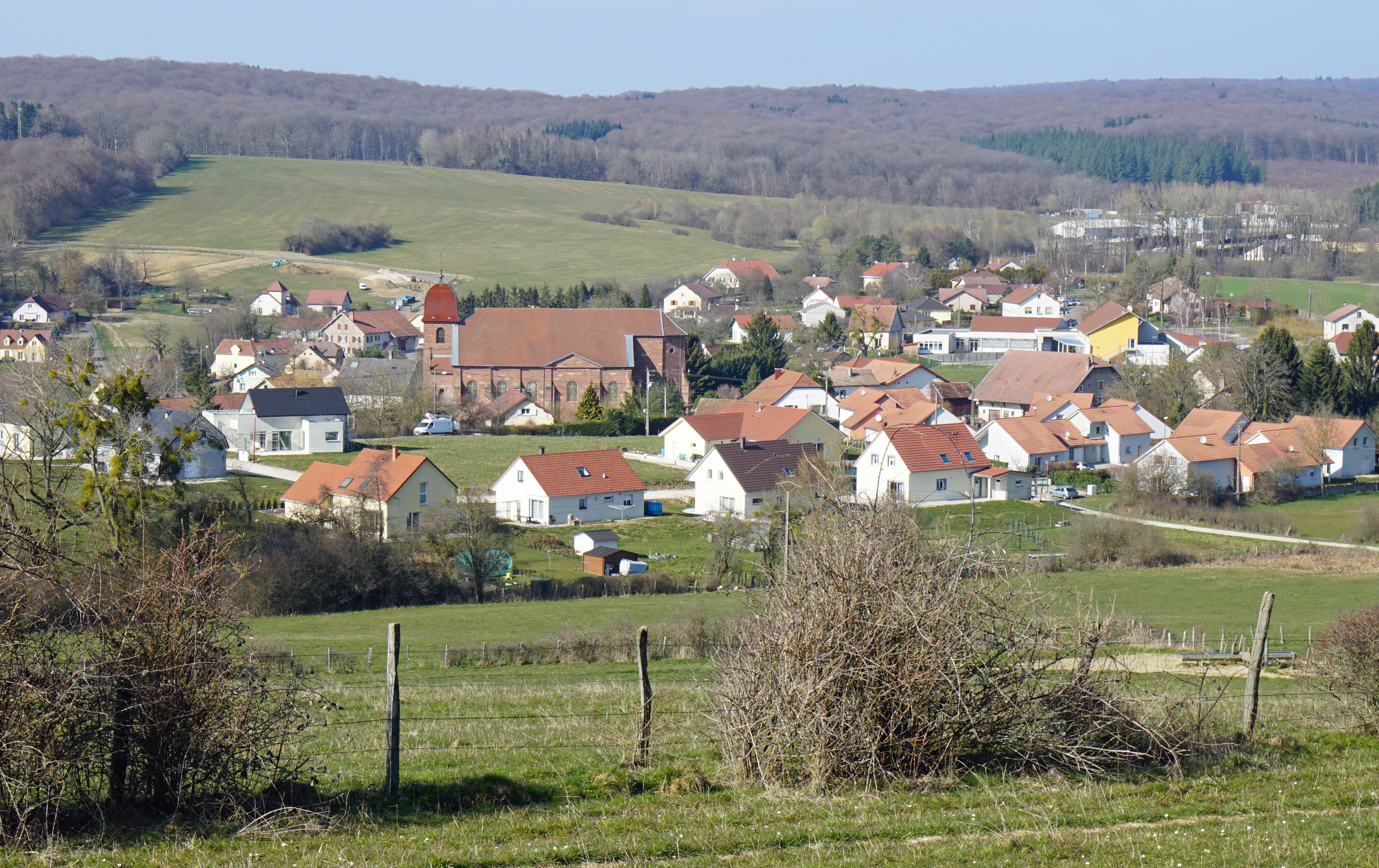 Vue générale de Saulnot.